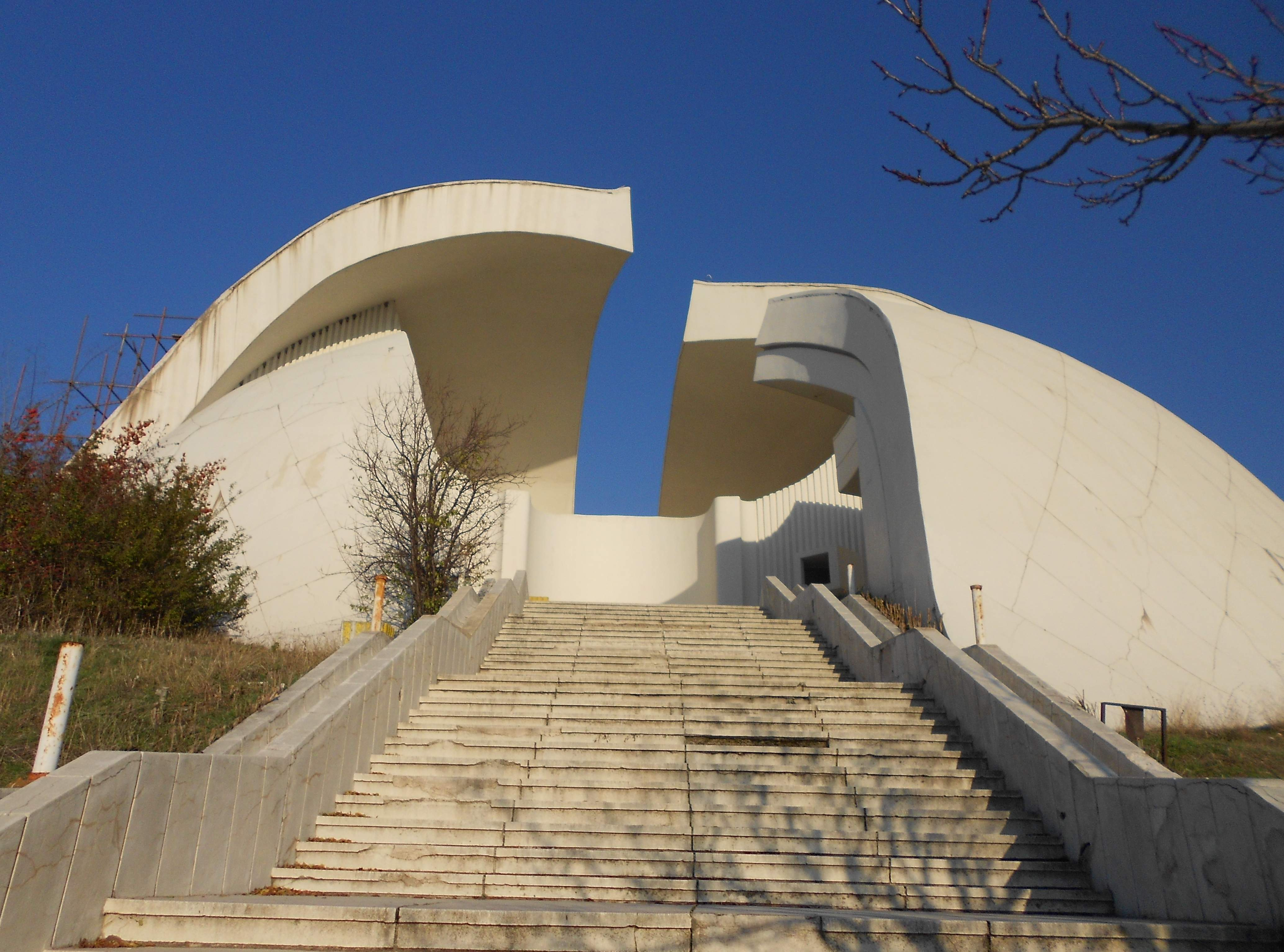 Спомен-костурницата во Велес